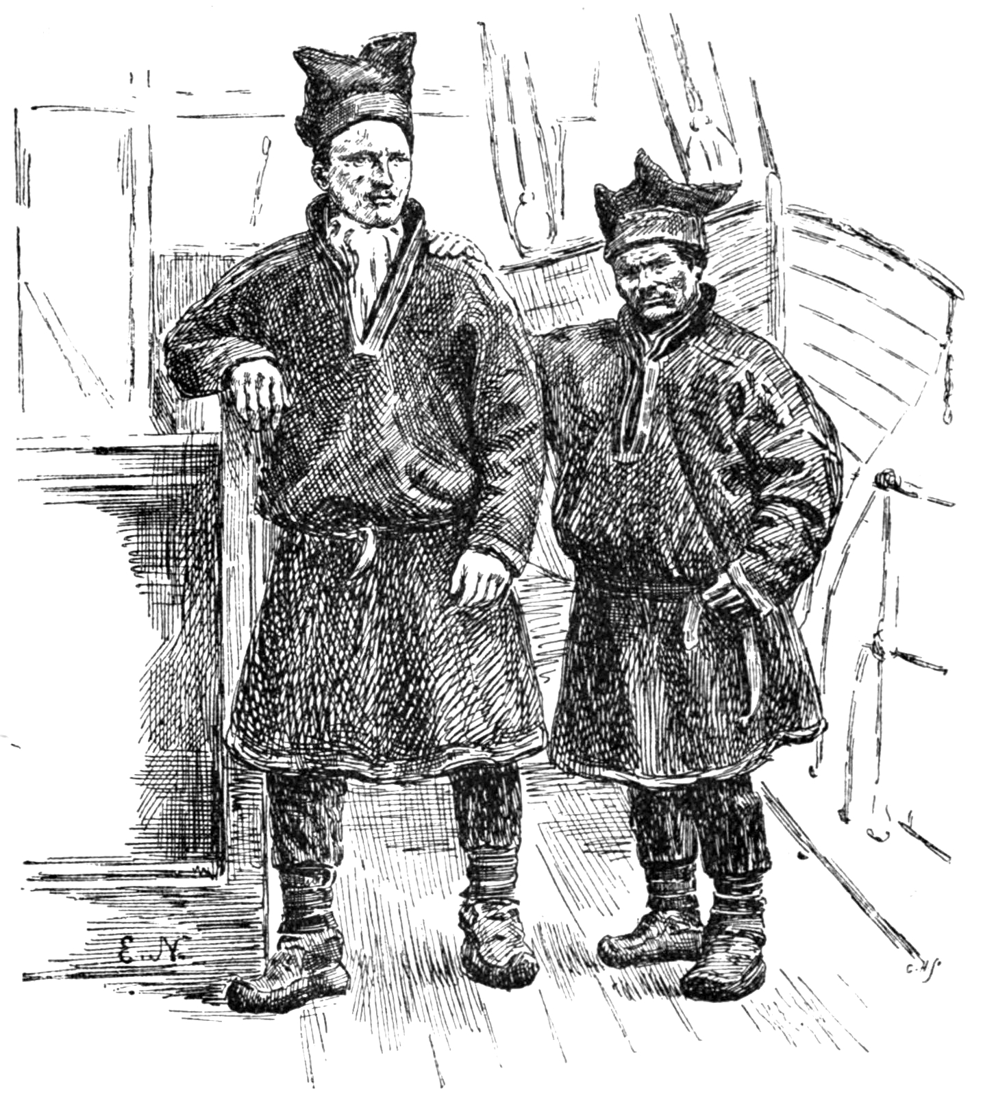 Самуэль Балту и Оле Нильсен Равна - саамы, участники гренландской экспедиции Нансена.